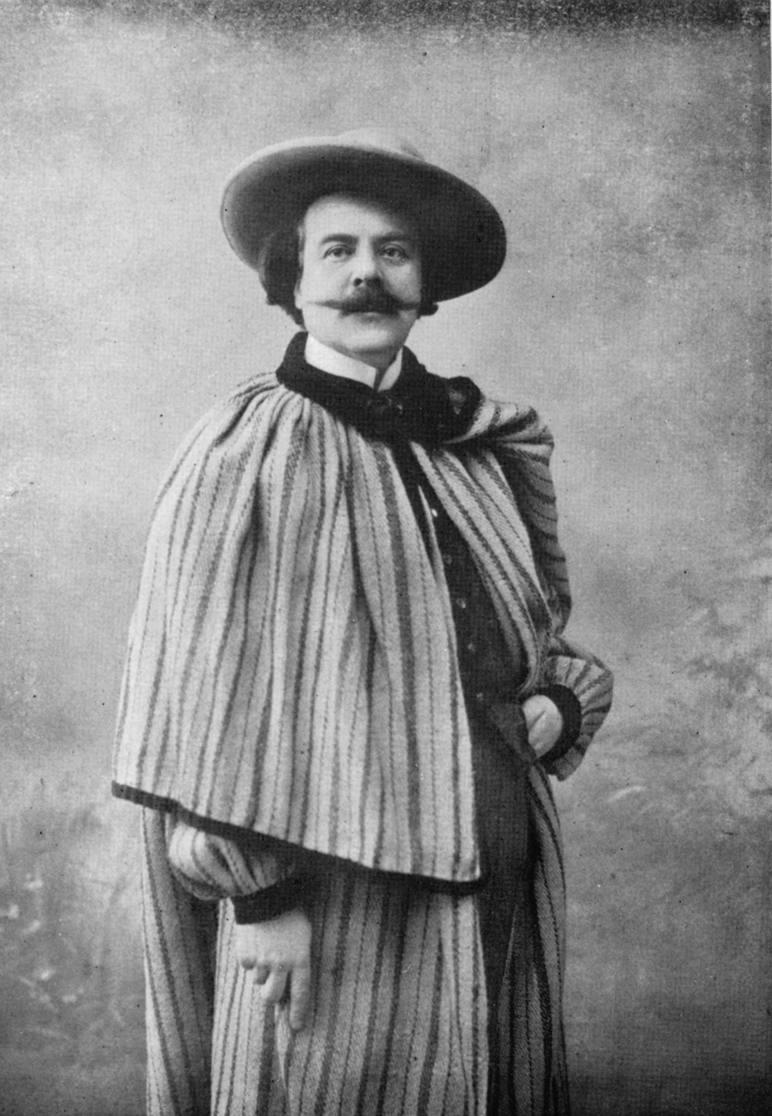 Hugues La paire en costume berrichon en 1904